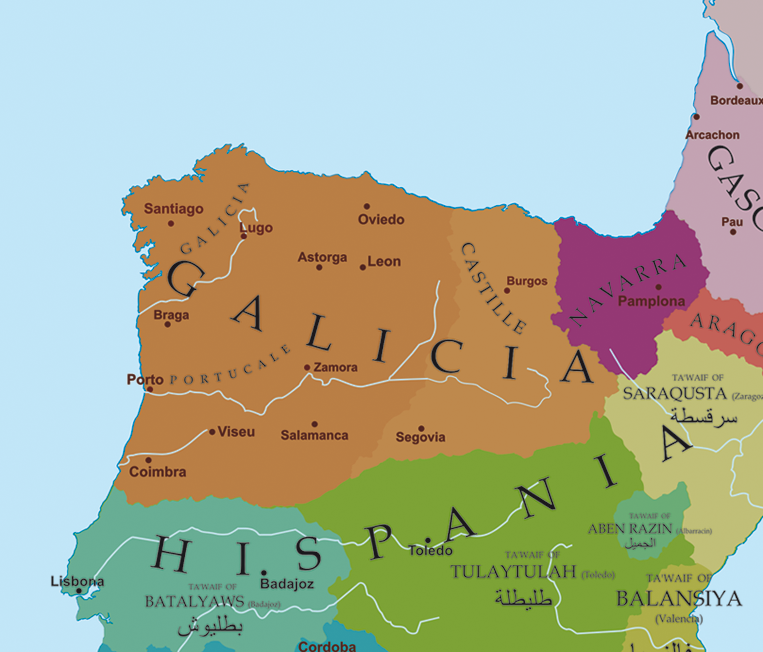 Mapa político do noroeste da Península Ibérica no ano 1064, previo á creba política do reino alto-medieval de Galicia.